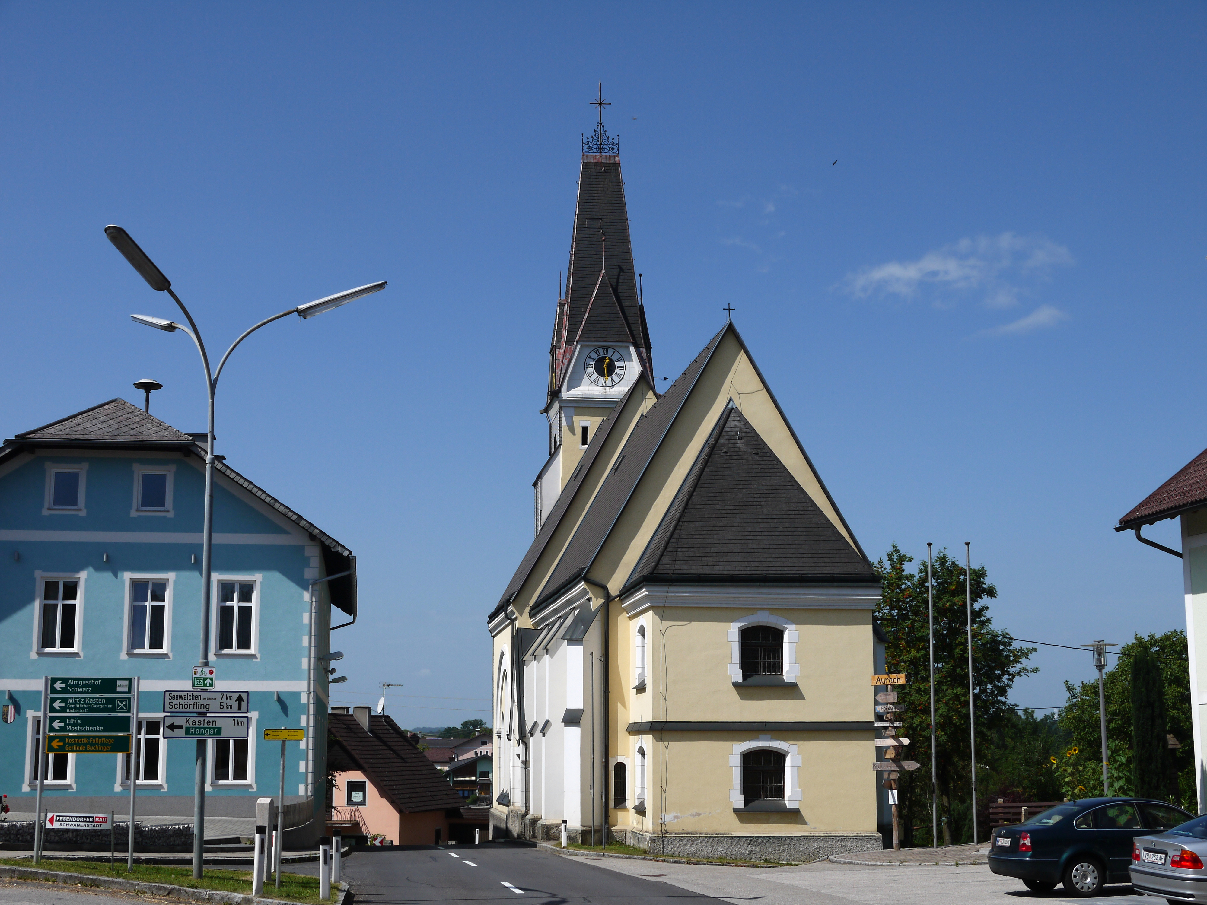 Die kath. Pfarrkirche hl. Alexius und ehem. Friedhofsfläche in Aurach am Hongar